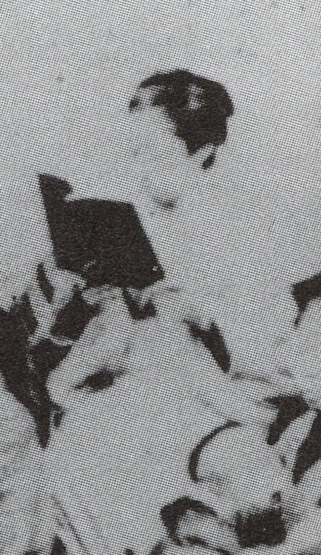 照姫(保科正丕の女、松平容敬養女、奥平昌服の正室)の肖像写真。